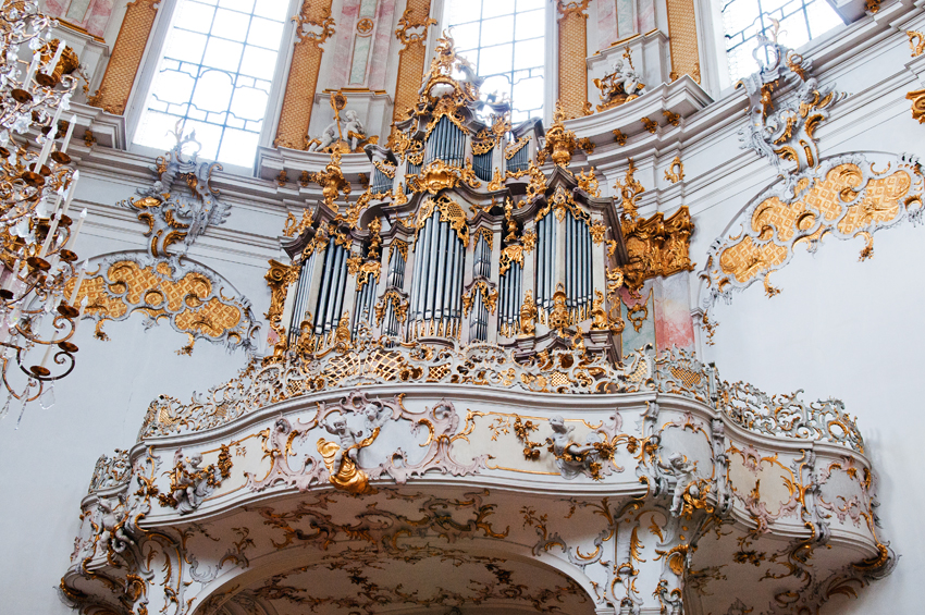 82488 Ettal, Germany